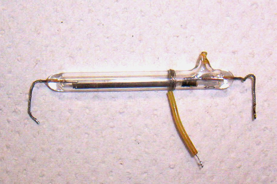 Xenon-Blitzröhre aus einem Fotoblitzgerät, Länge ca. 50mm, Energie ca. 2Ws max., der Mittelanschluss ist die kapazitive Zündelektrode